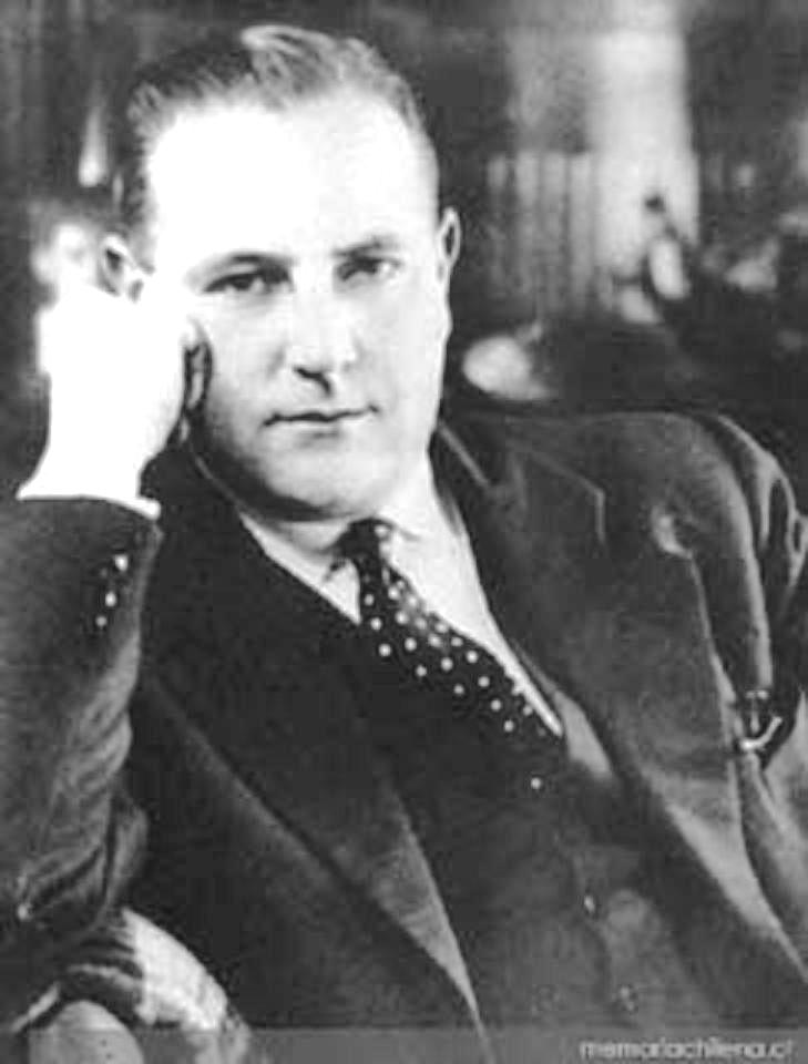 El escritor chileno Benjamín Subercaseaux Zañartu (Santiago, 20 noviembre 1902 - Tacna, 11 marzo 1973; estudios en Colegio de los SS.CC.; Universidad de Chile; Médico Cirujano; Doctor en Sicología de la Universidad de La Sorbonne, París; escritor; Premio Nacional de Literatura 1963.